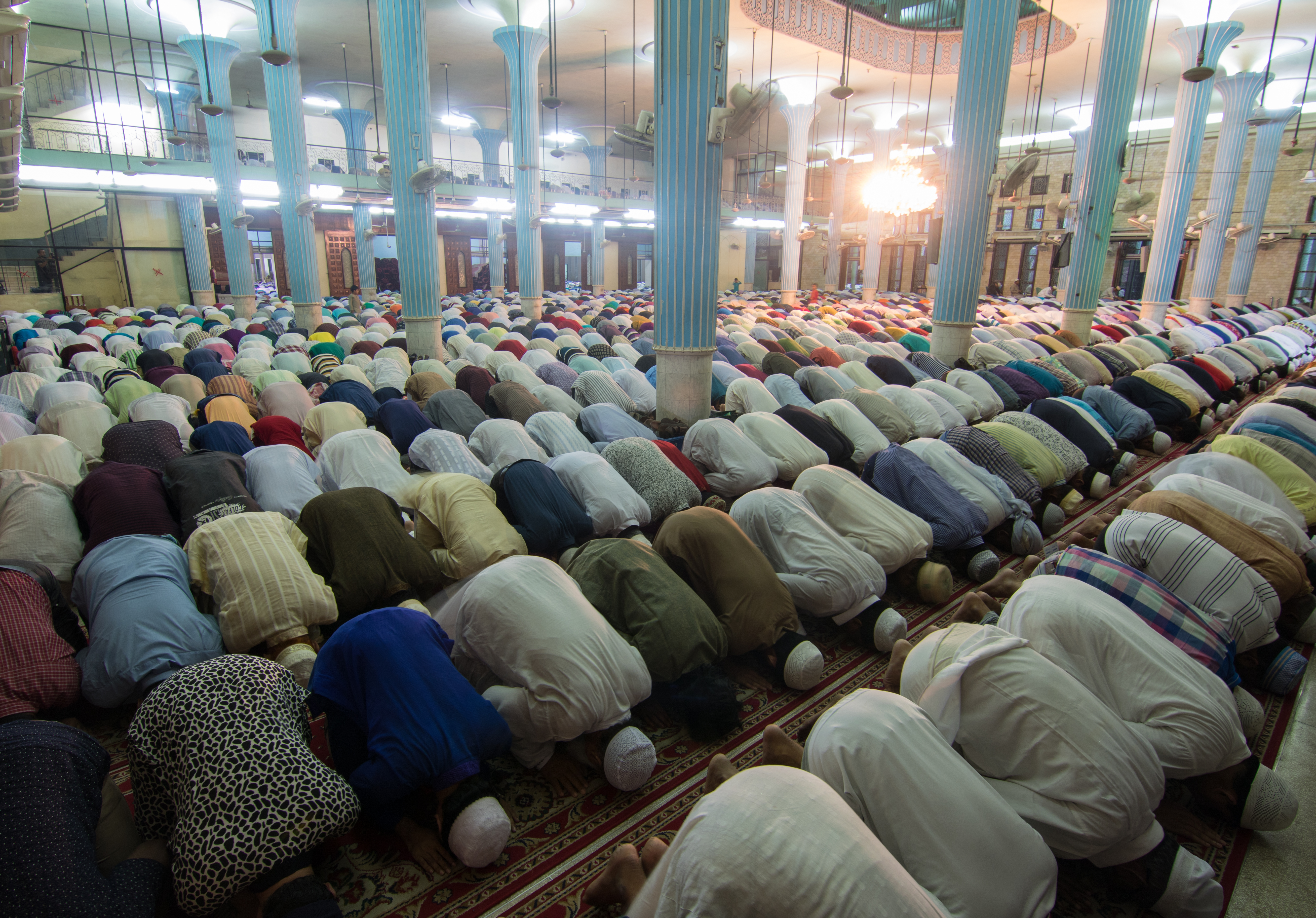 বায়তুল মোকাররম